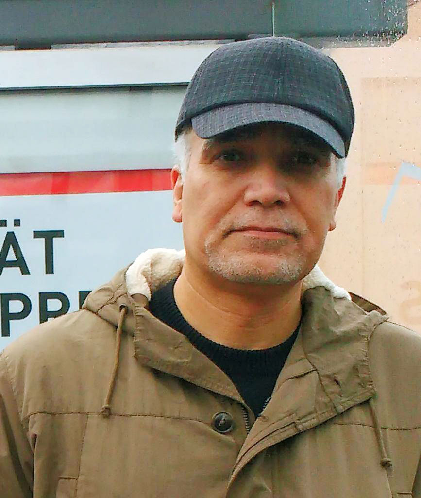 M. Reza TORABI, Fondinto de Irana Esperantista Junulara Organizo kaj Irana Esperanto-Asocio.